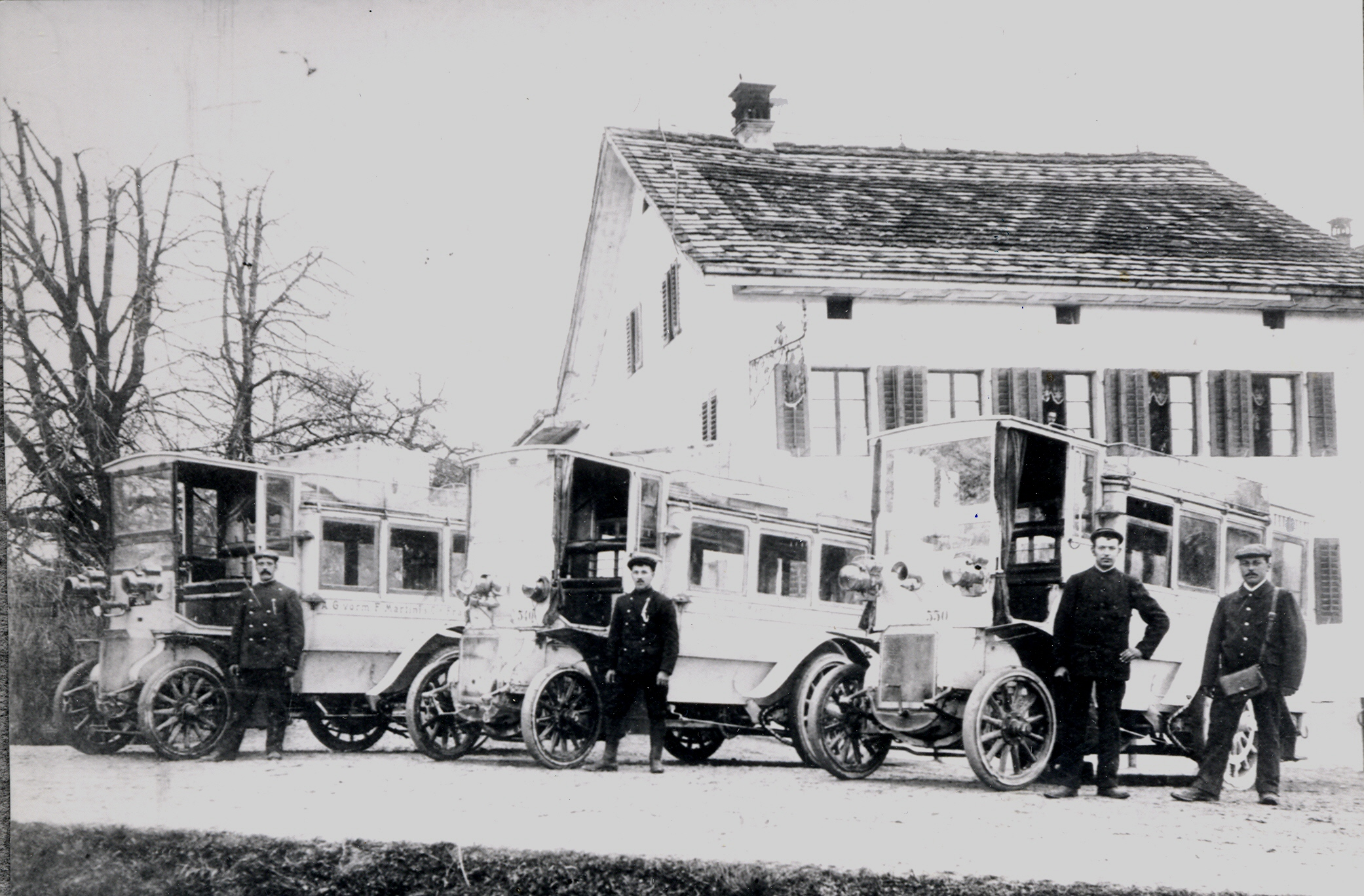 Martinibusse in Egg ZH, um 1910